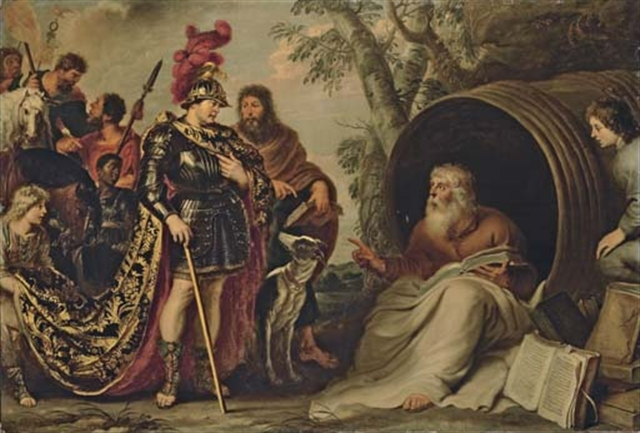 Alexander and Diogenes